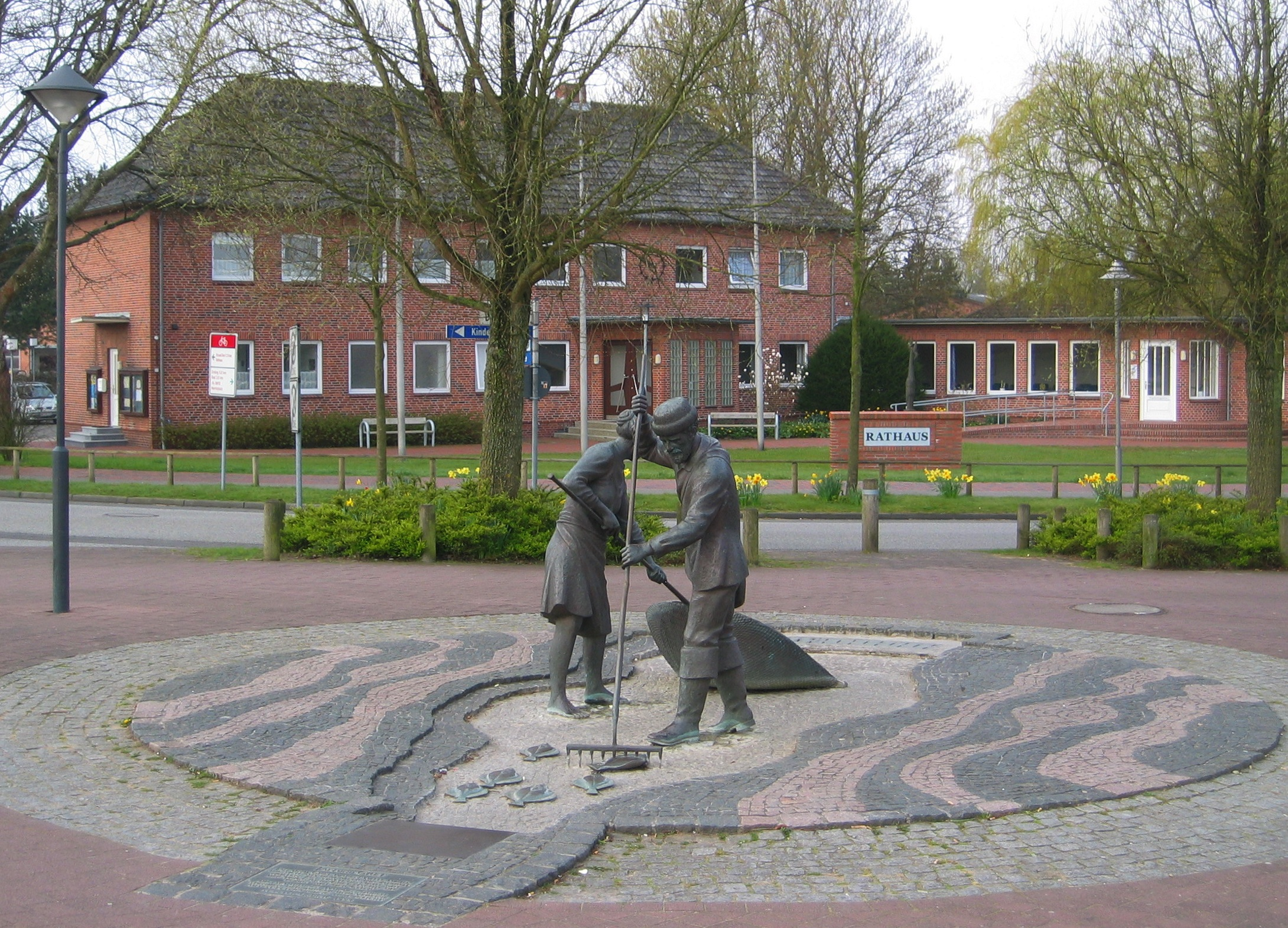 Brunnenplastik „Jan und Gret“ (zum Aufnahmezeitpunkt ohne Wasser) vor dem Rathaus von Sankt Peter-Ording (Dorf) in Schleswig-Holstein, Deutschland. – „Jan mit de Prigg“ und „Gret mit de Gliep“ sind eine Spendenleistung der örtlichen Bevölkerung und wurden nach zwei alten Fotos gestaltet. Sie symbolisieren die „lütten Lüüd“ (kleinen Leute) von Sankt Peter und Ording in Zeiten vor dem Tourismus, die dem Meer in mühevoller Arbeit u.a. Muscheln, Krabben, Krebse und Schollen abrangen. Die bronzene Figurengruppe wurde 1997 von dem deutschen Bildhauer Claus Homfeld geschaffen.